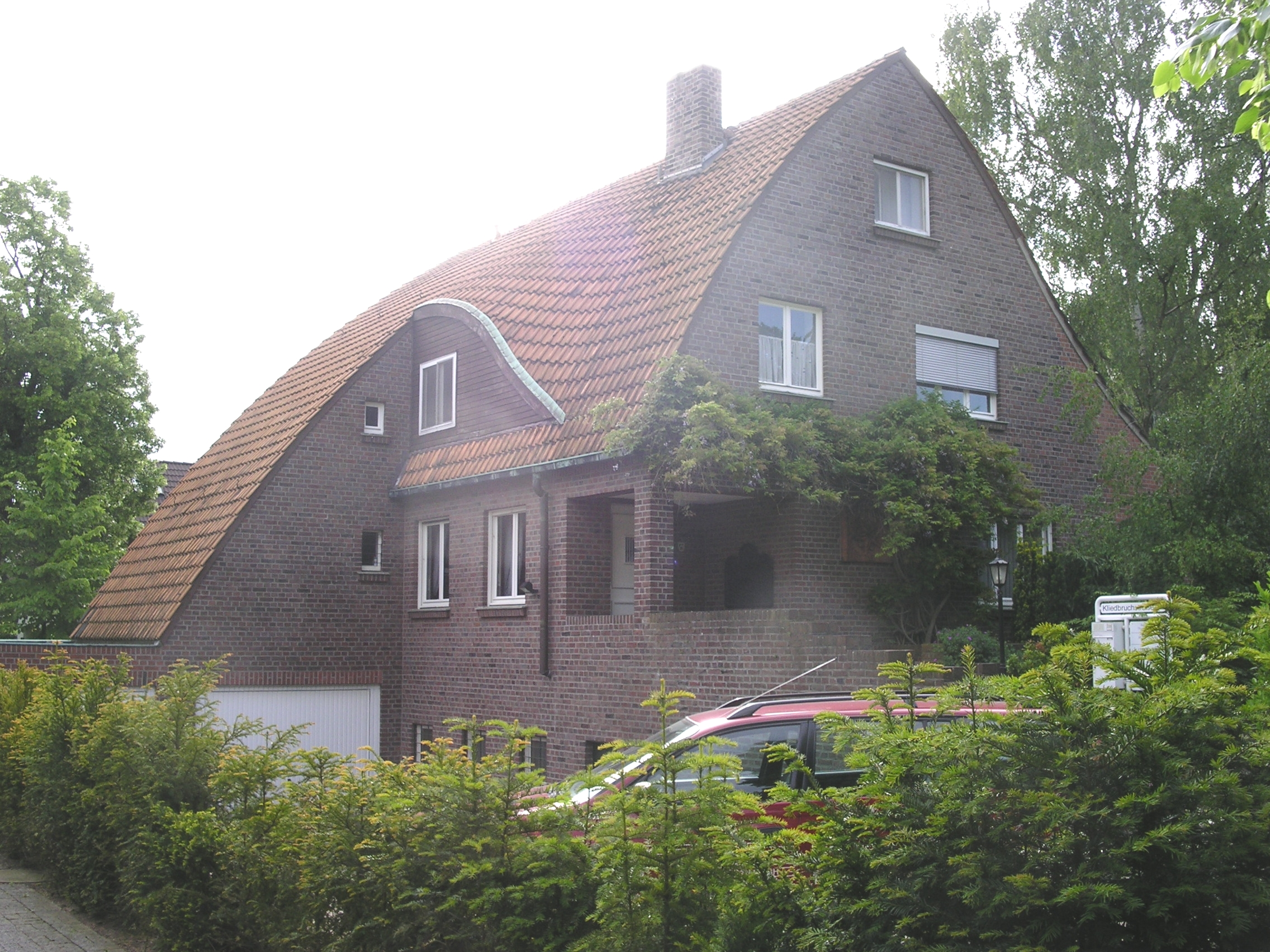 Haus im Krefeld-Kliedbruch, 1929–1931 erbaute Villa von dem bekannten Architekten Hans Poelzig